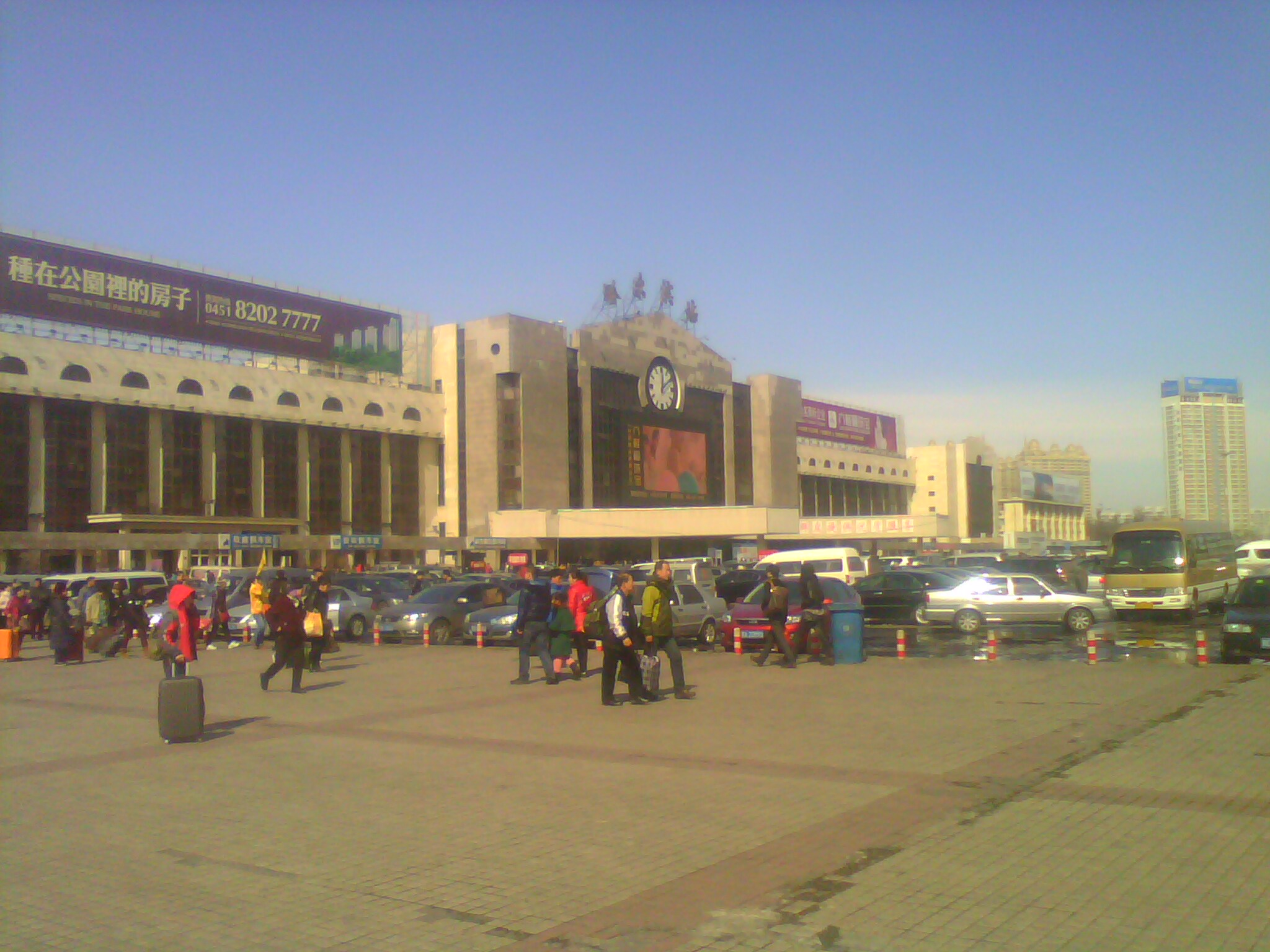 中文（中国大陆）: 哈尔滨火车站。